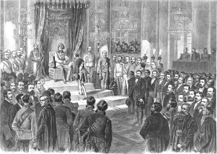 Kaiser Franz Josef I. eröffnet im Zeremoniensaal der Hofburg den Reichsrat. Zeichnung, wiedergegeben als Xylografie.